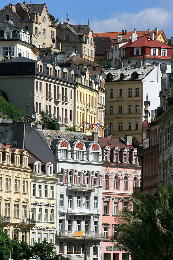 The Bohemian town of Karlovy Vary, Czech Republic (Pohled z Mlýnské kolonády na zástavbu nad Vřídelní ulicí)